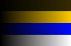 RGBW bars (protanopia)